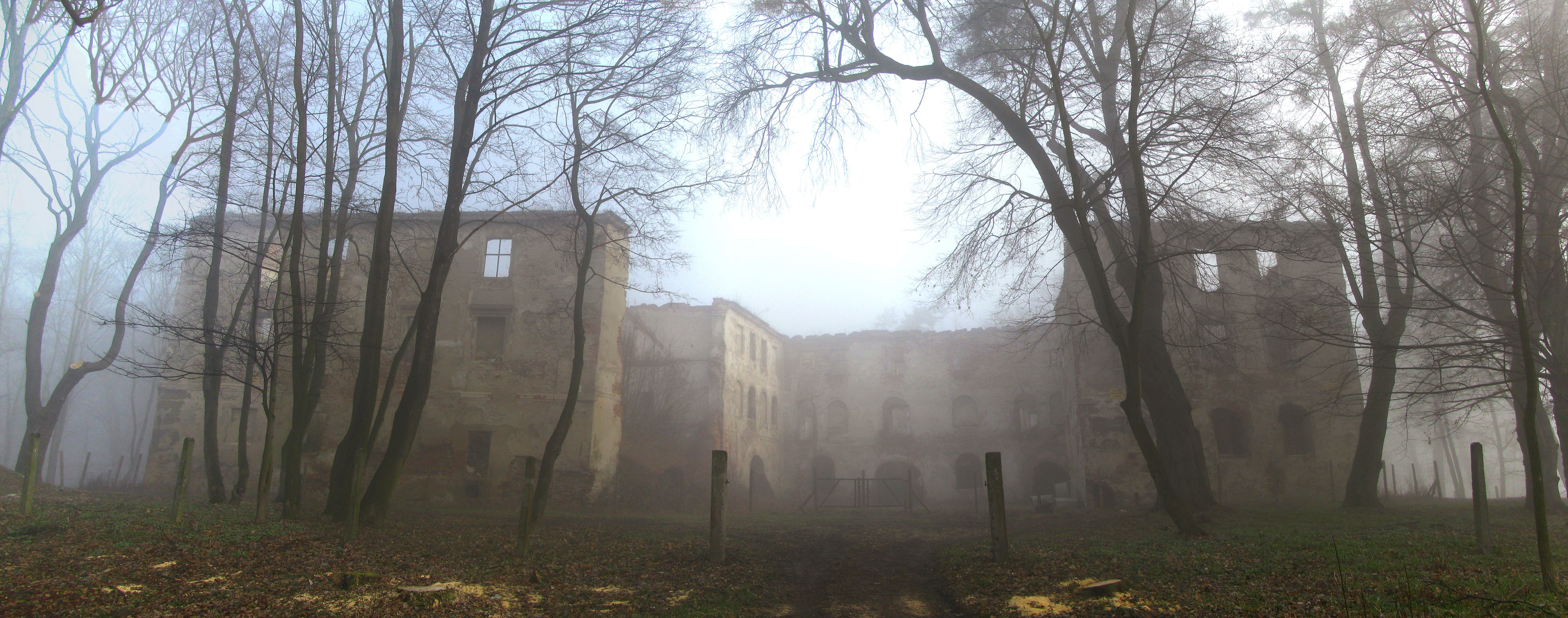 Ruiny średniowiecznego zamku w Chrzelicach. Widok od strony południowej (nr rejestru: 548/59 z 20.02.1959)